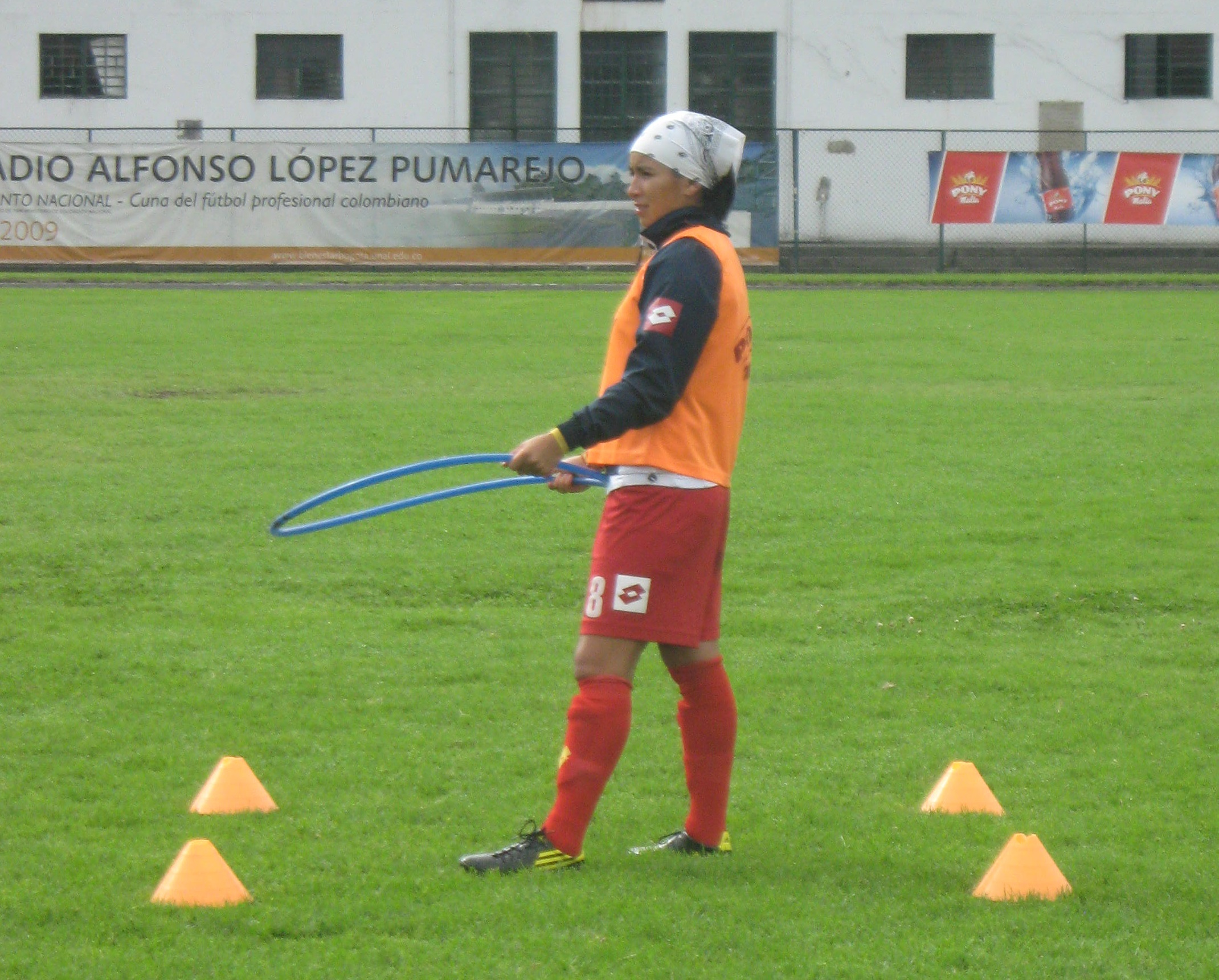 Paola Sánchez en el estadio Alfonso López Pumarejo de la ciudad blanca, durante uno de los entrenamientos de la selección colombia sub 20 femenina que participó en el mundial de Alemania en 2010.